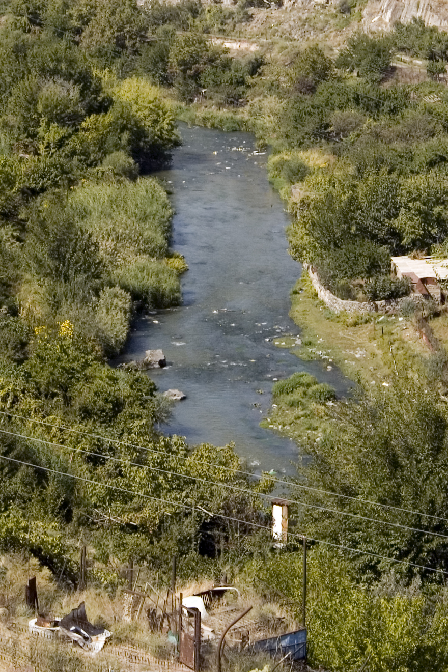 Razdan River by Karmir Blur